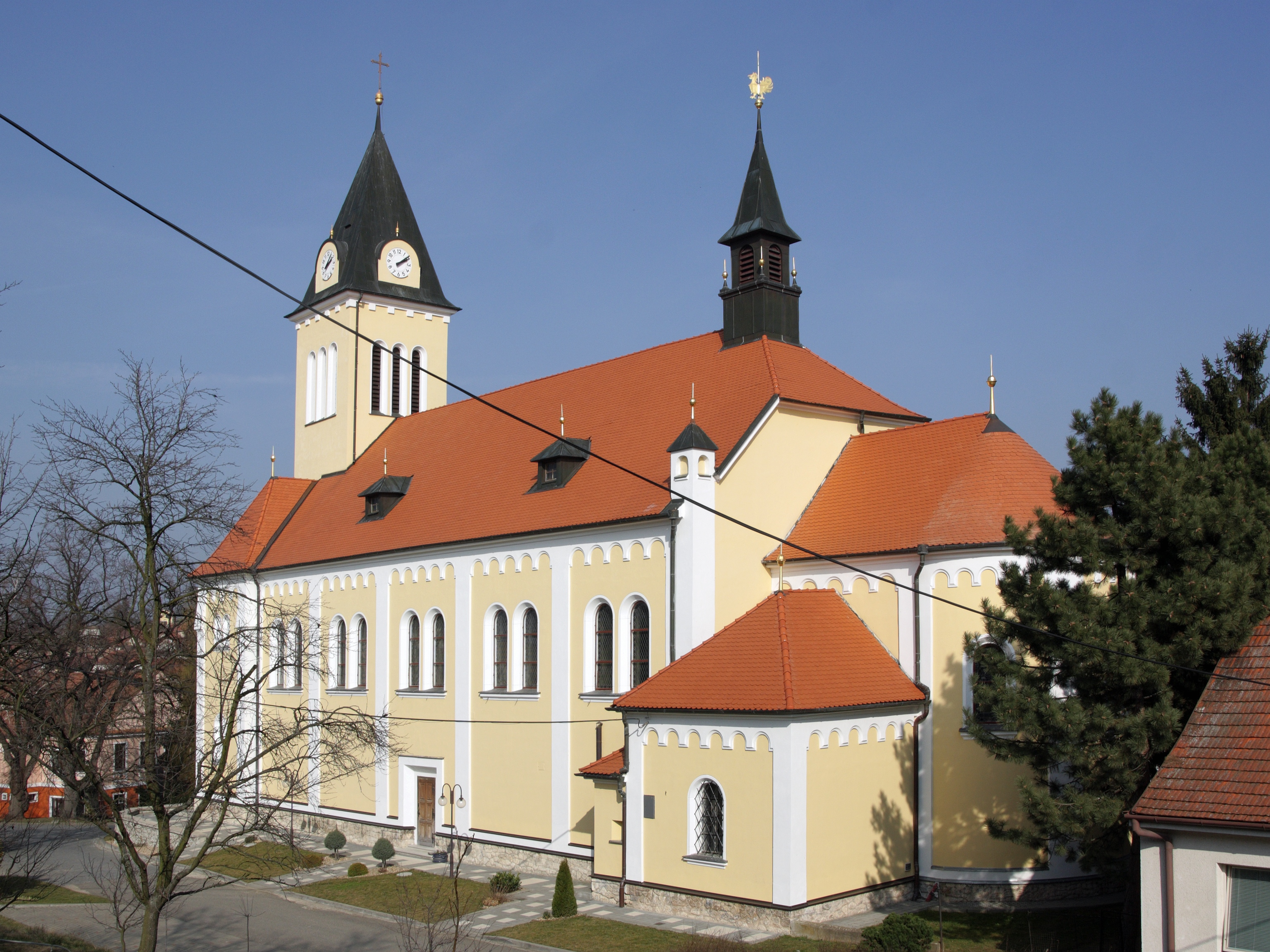 Šitbořice - kostel svatého Mikuláše.